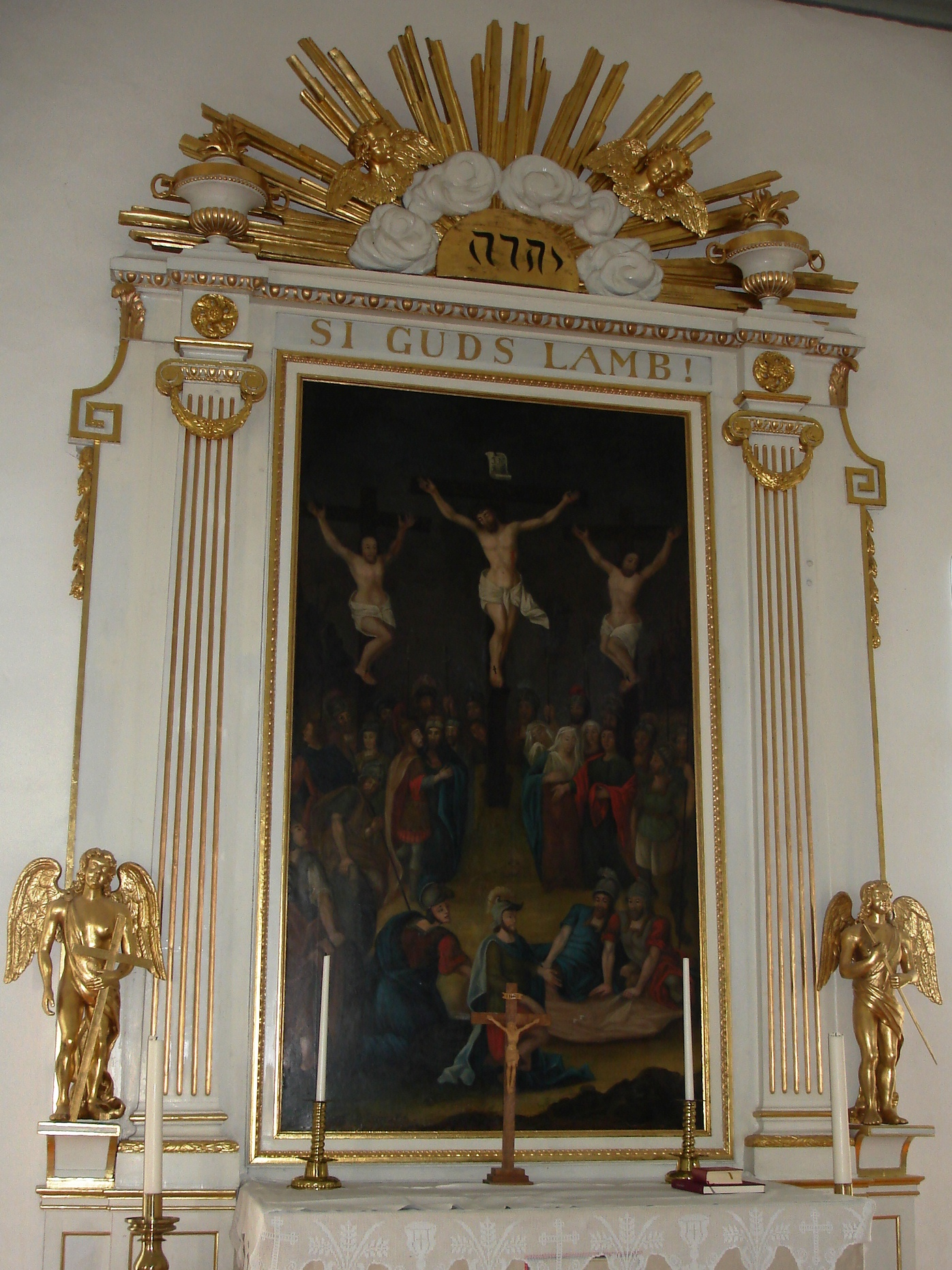 Västra Karups kyrka på Bjärehalvön, i Båstads kommun